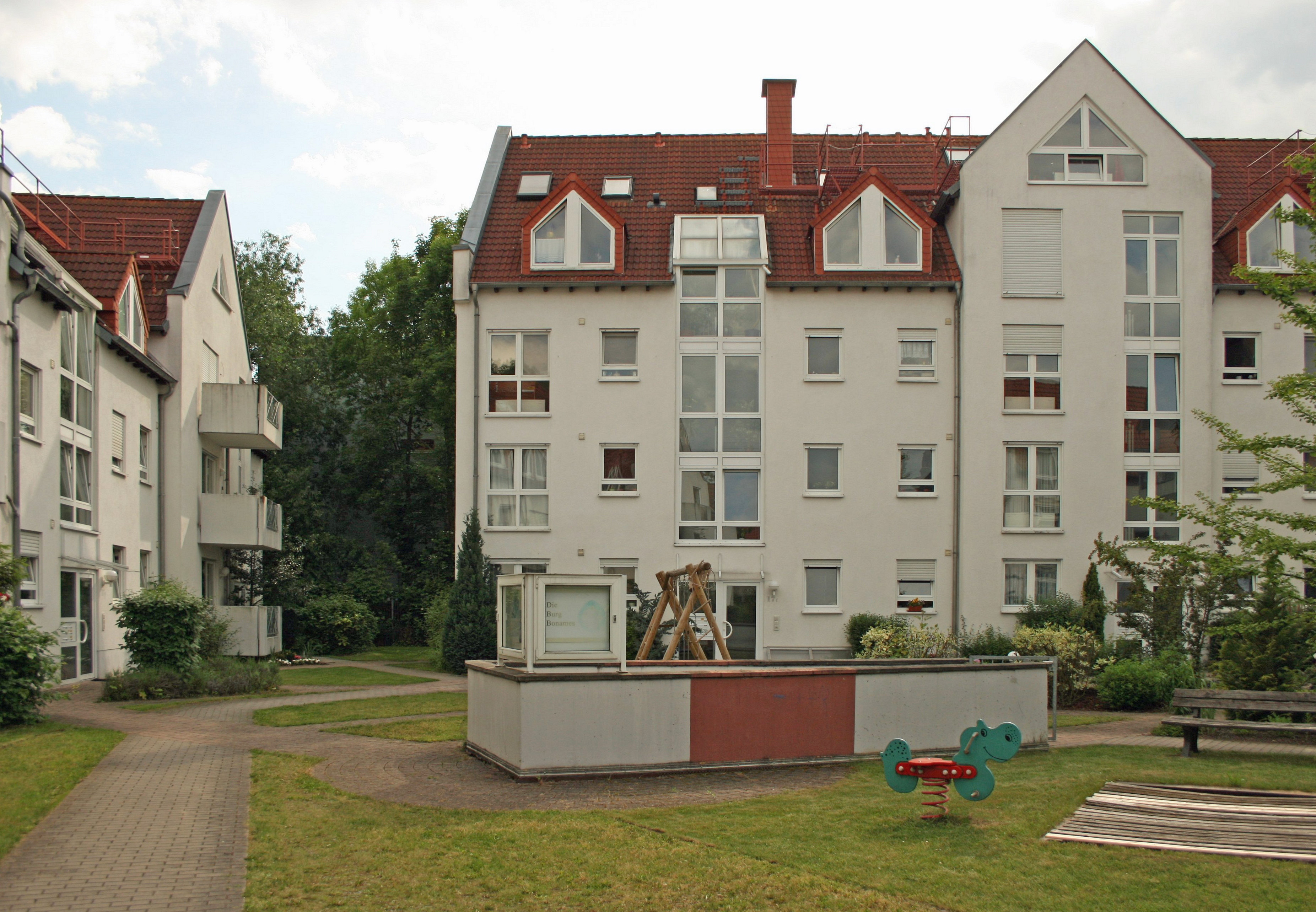 Ehemalige Burg Bonames in Frankfurt-Bonames. Situation 2009 in der modernen Bebauung. Neben dem Eingang zur Tiefgarage befinden sich Schaukästen zur Burganlage, die Mauerzüge wurden am Boden mit roten Pflastersteinen markiert.